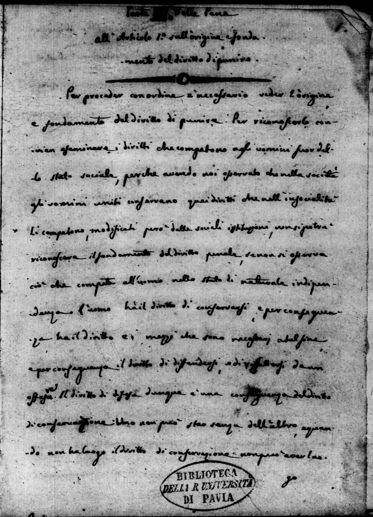 manuscript in lat. Pavia, Biblioteca Universitaria, Fondo Ticinesi, Ticinesi 98. - secolo 19. : cartaceo ; 190 x 130 mm